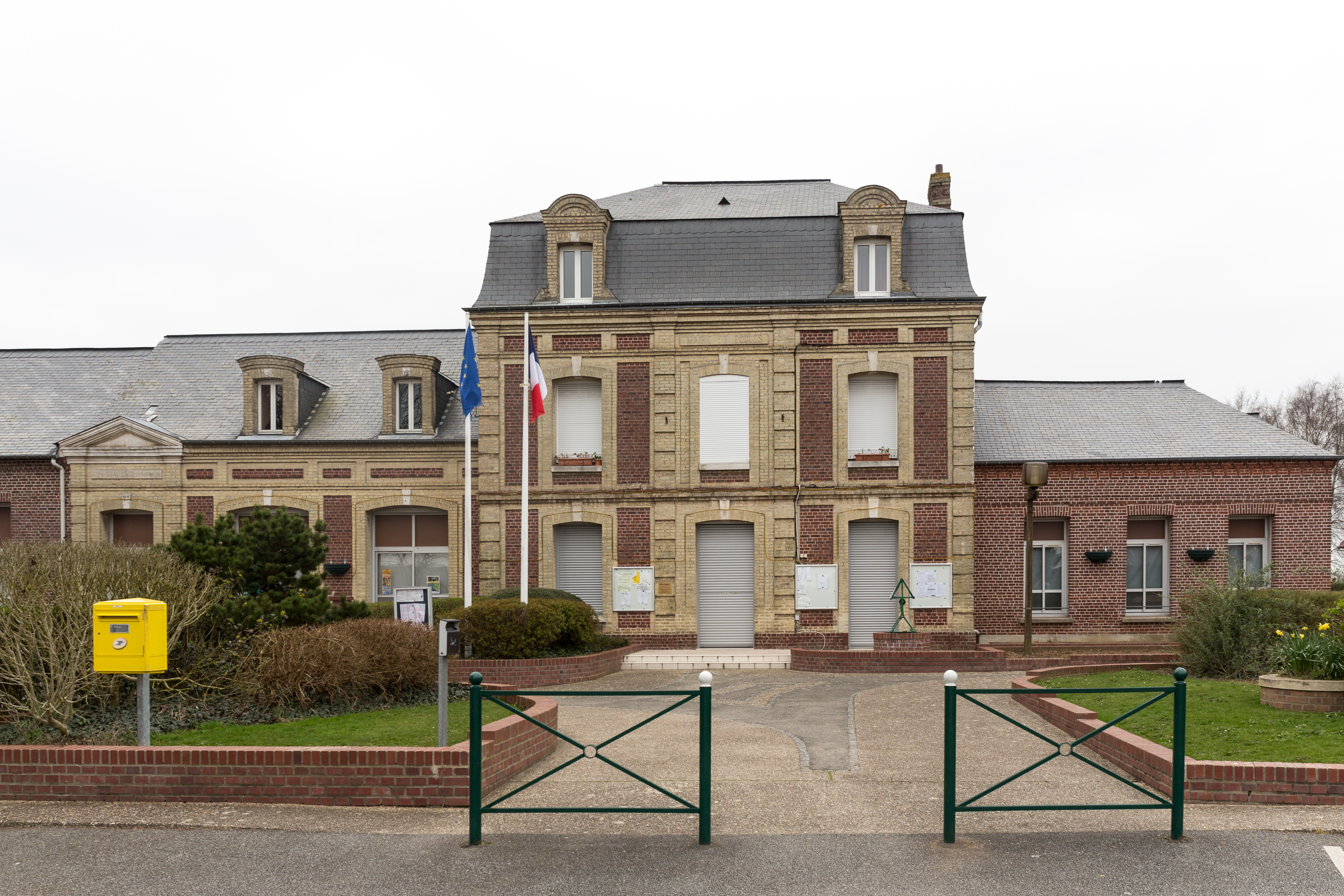 Mairie-école de Beuzevillette.